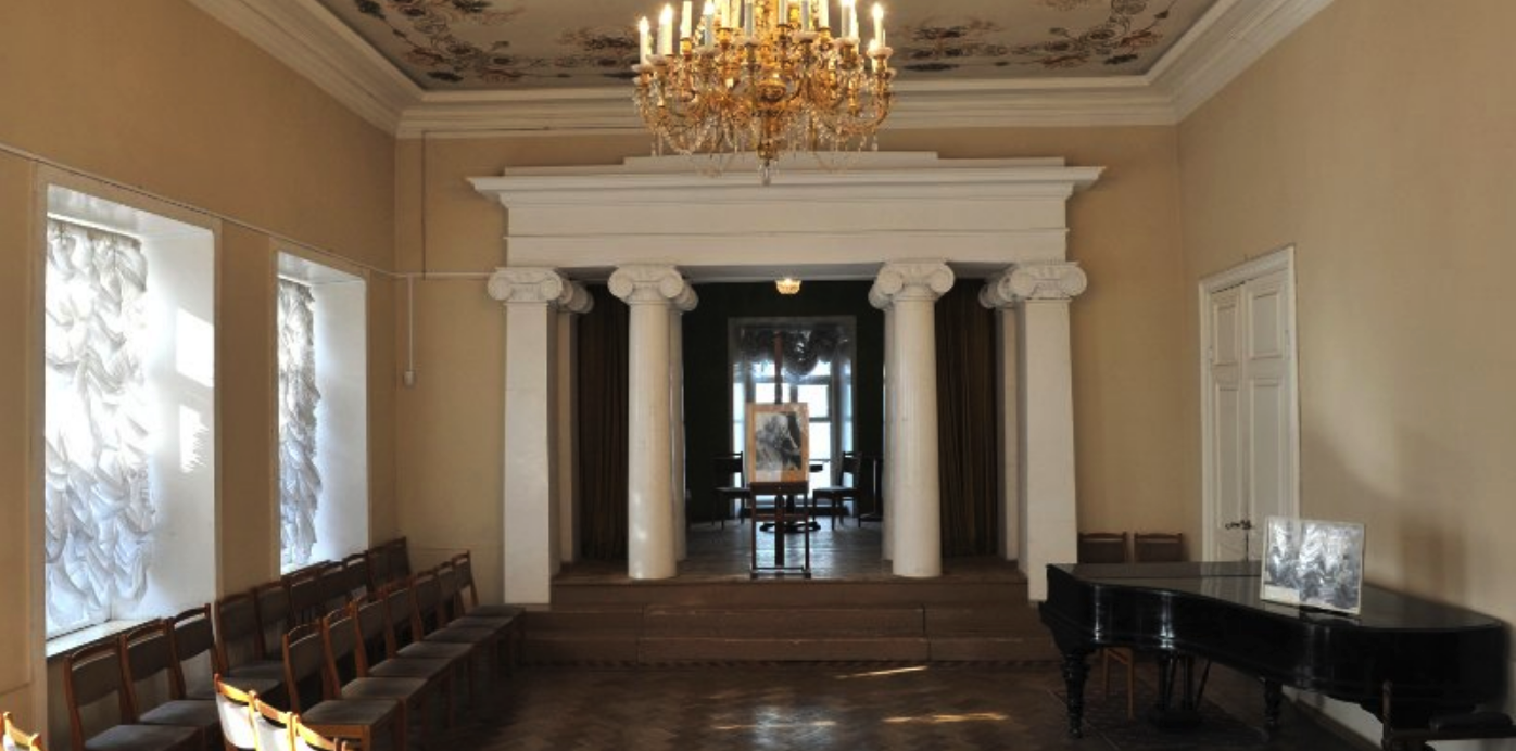 Концертный зал в доме-музее Константина Станиславского в Леонтьевском переулке, 2018 год